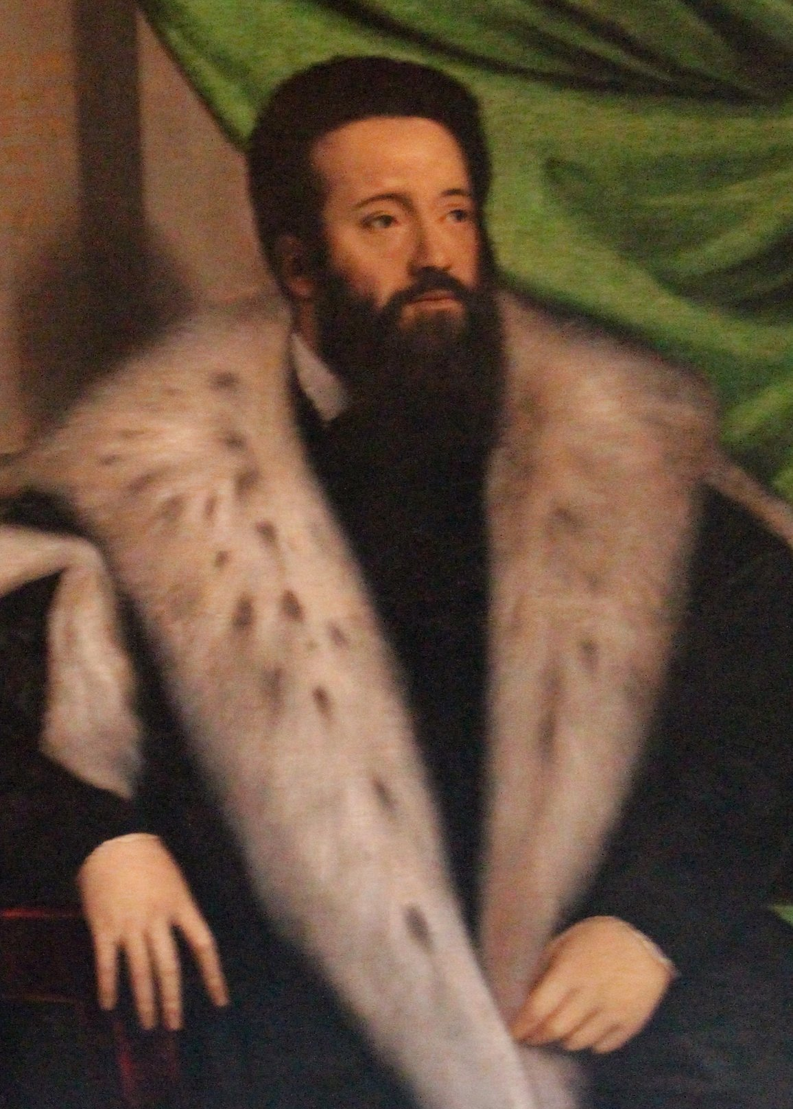 Villa del Principe (Genova)